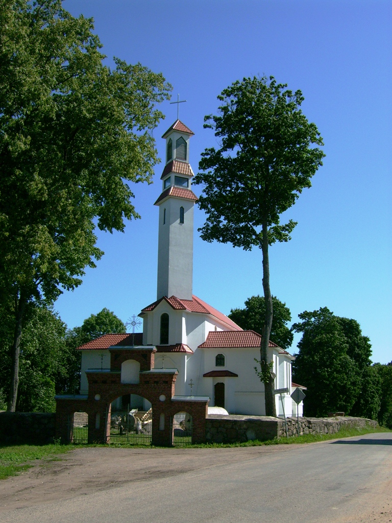 Gaurės Šv. arkangelo Mykolo bažnyčia